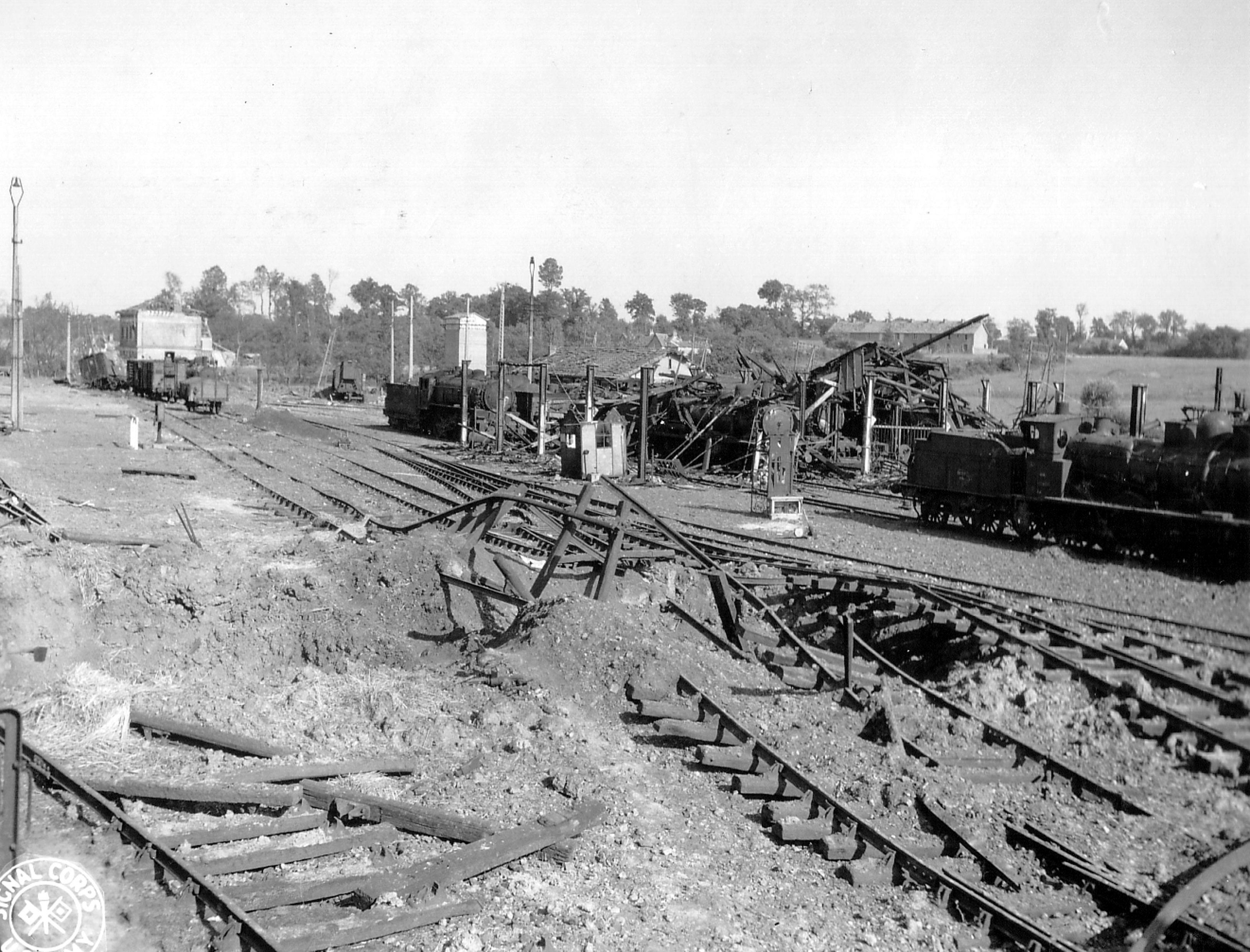 Gare de Lison pendant la bataille de Normandie